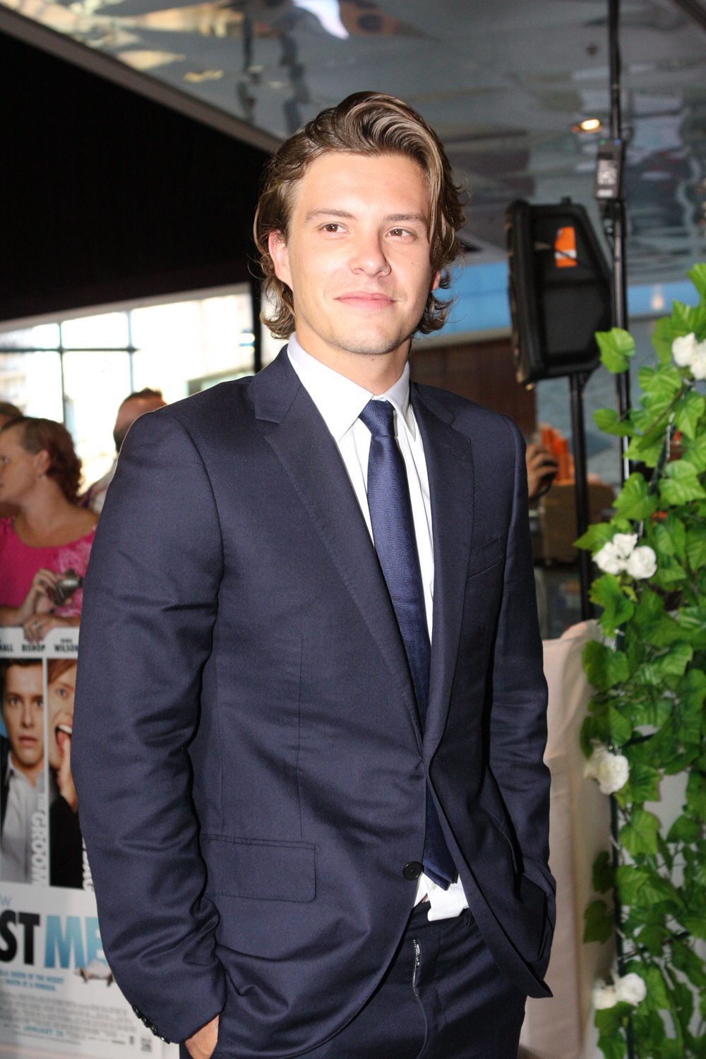 A Few Best Men Red Carpet Movie Premiere In Sydney, Australia